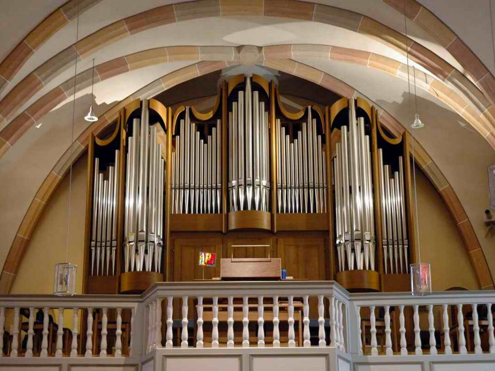 D'Uergel an der Eeschwëller Kierch. Photo vum Paschtouer Francis Erasmy. Eschweiler Wolz Kategorie:Gemeng Eschweiler